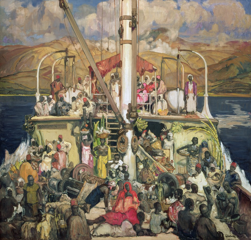 De pontboot